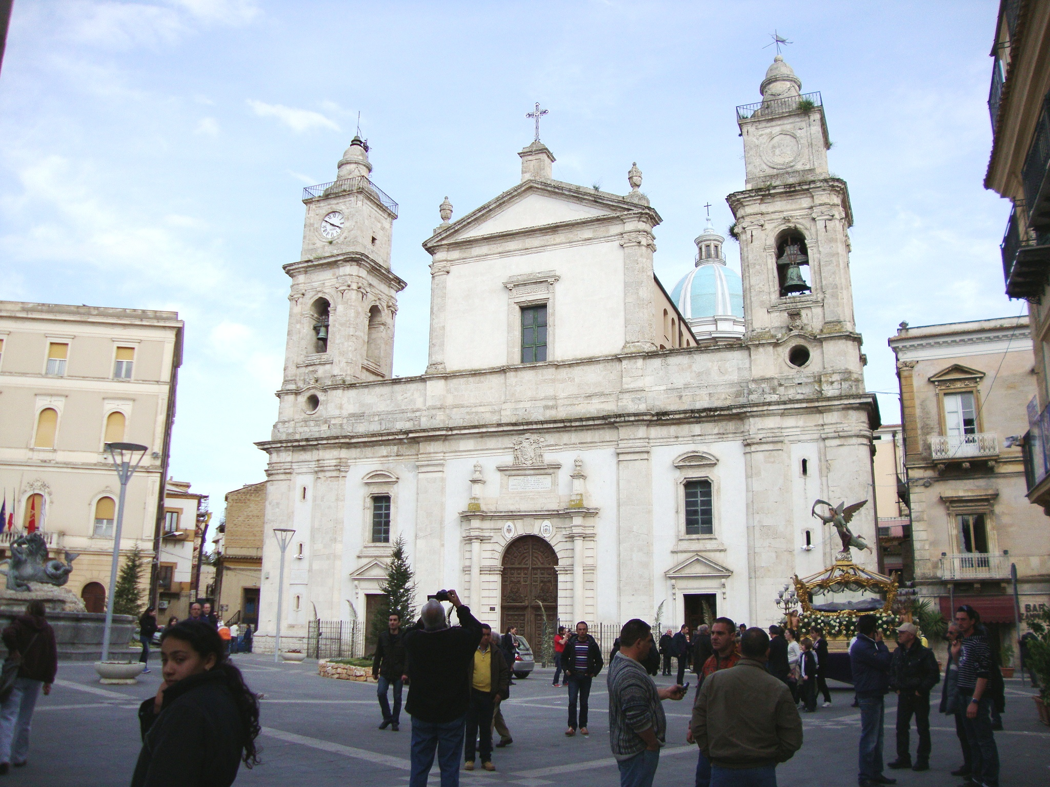 La piazza Garibaldi fotografata il 1º aprile 2010, giovedì santo, in occasione delle manifestazioni cittadine per le celebrazioni religiose della Settimana Santa.